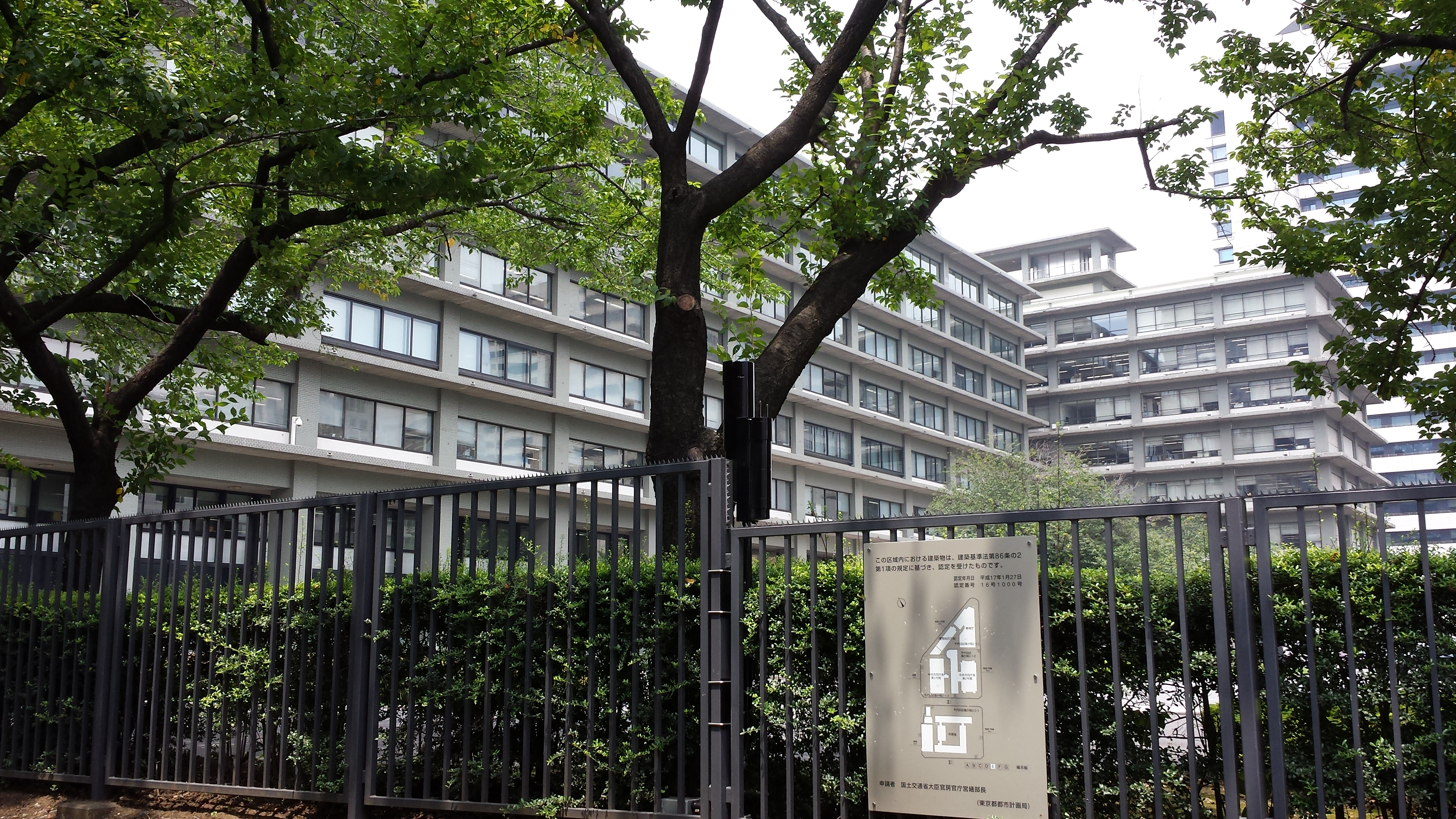 外務省庁舎